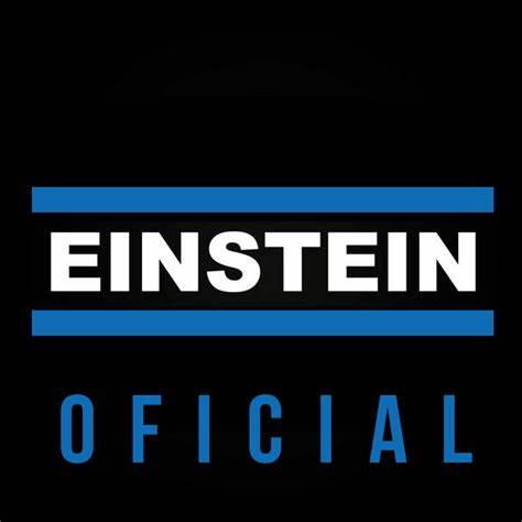 Logo da Escola Etec Albert Einstein